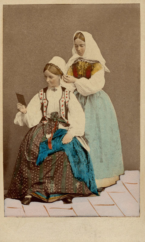 Dräktdockor med huvuden skulpterade av C A Söderman, visade på världsutställningen i Paris 1867. Två kvinnor i folkdräkter från Blekinge, varav en hjälper den andra med huvudbonaden. Handkolorerad version.